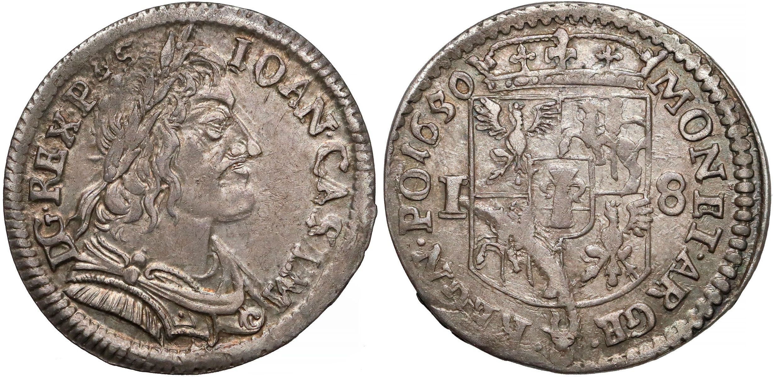 Ort koronny 1650 Wschowa